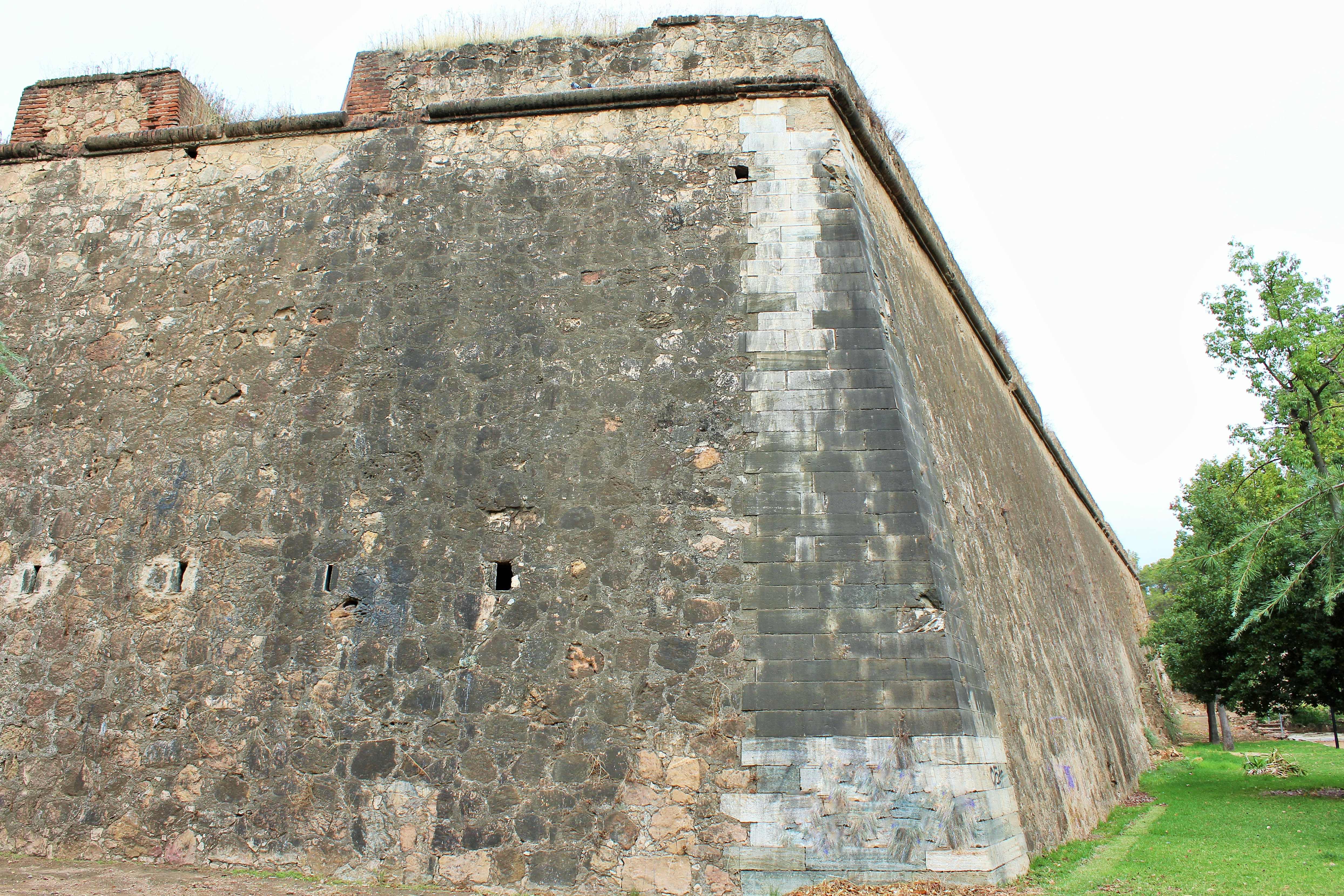 Lienzos en esquina hechos de sillares con marcas de impactos de balas de cañones y aspilleras